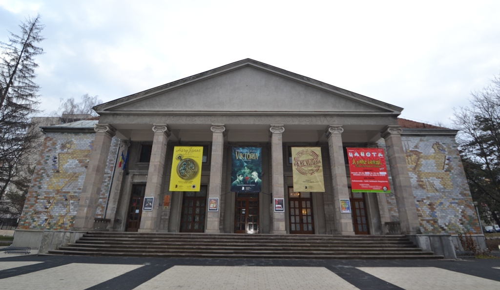 Csíkszeredai színház